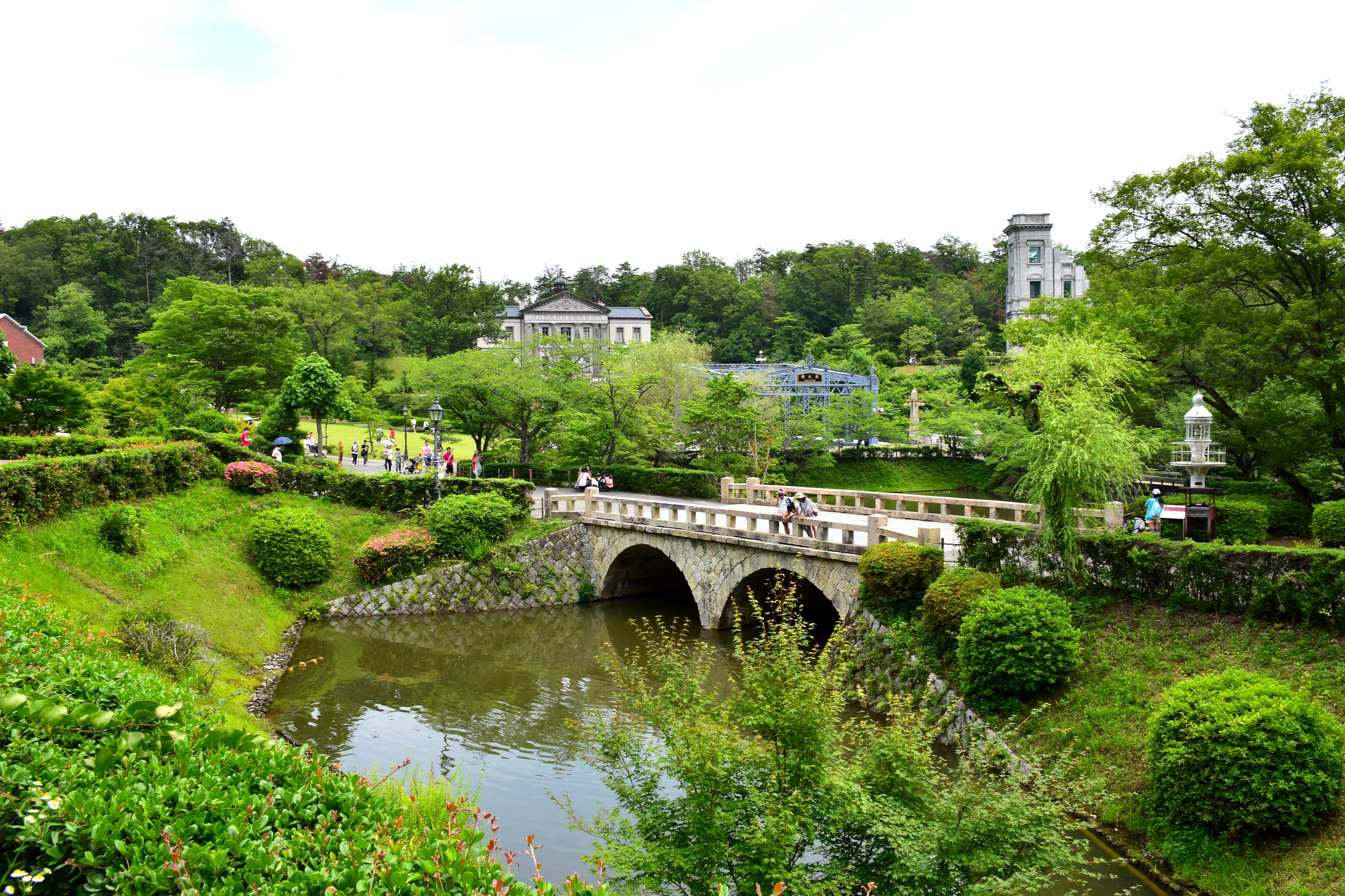 明治村 村内風景